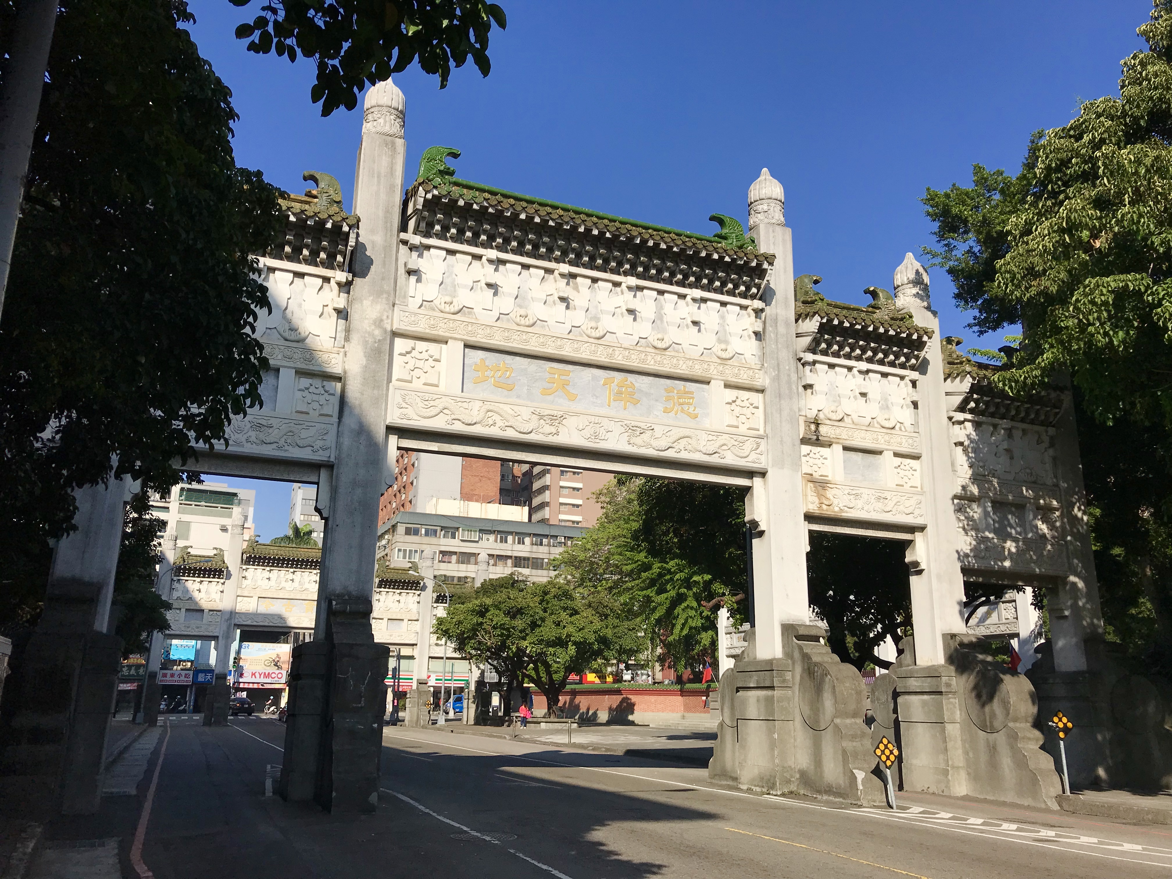 臺中孔子廟牌樓